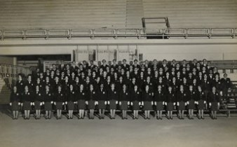 Coro 5